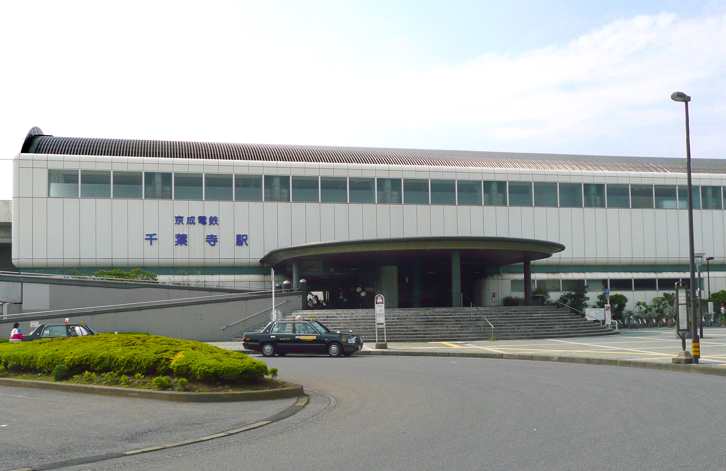 千葉寺駅